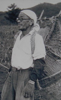 藤原嘉藤治